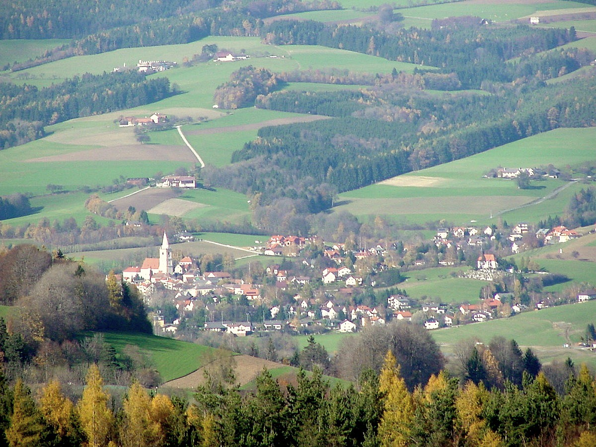 Krumbach, Niederösterreich (Bild 1)